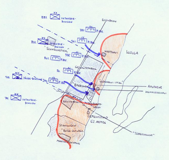 Gefechtsskizze Operation Hubertus November 1942